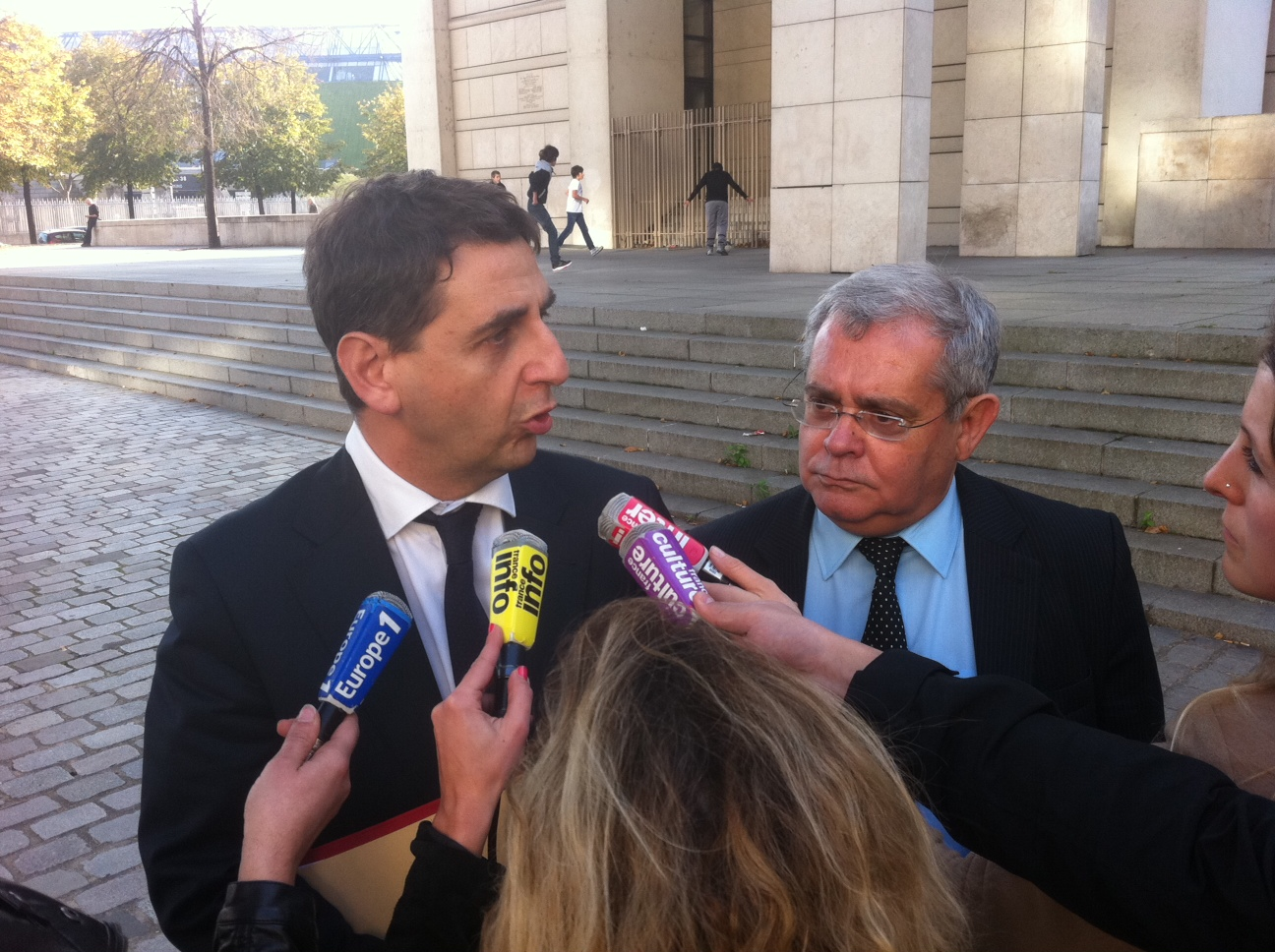 Le député de Seine-Saitn-Denis Daniel Goldberg avec le maire d'Aulnay-sous-Bois Gérard Ségura devant le Ministère des finances avant une réunion sur l'avenir du site de PSA Aulnay.